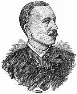 Flor Crombet